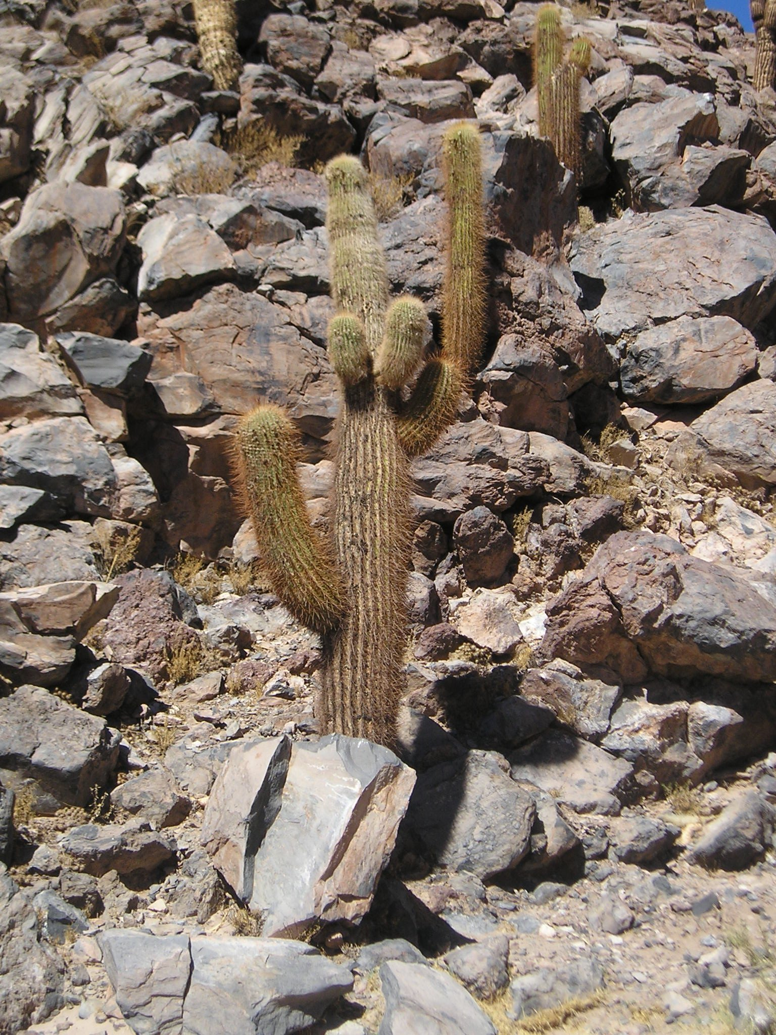 Cardón (Echinopsis atacamensis subsp. atacamensis) cactus from Guatín canyon near San Pedro de Atacama, Chilean altiplano